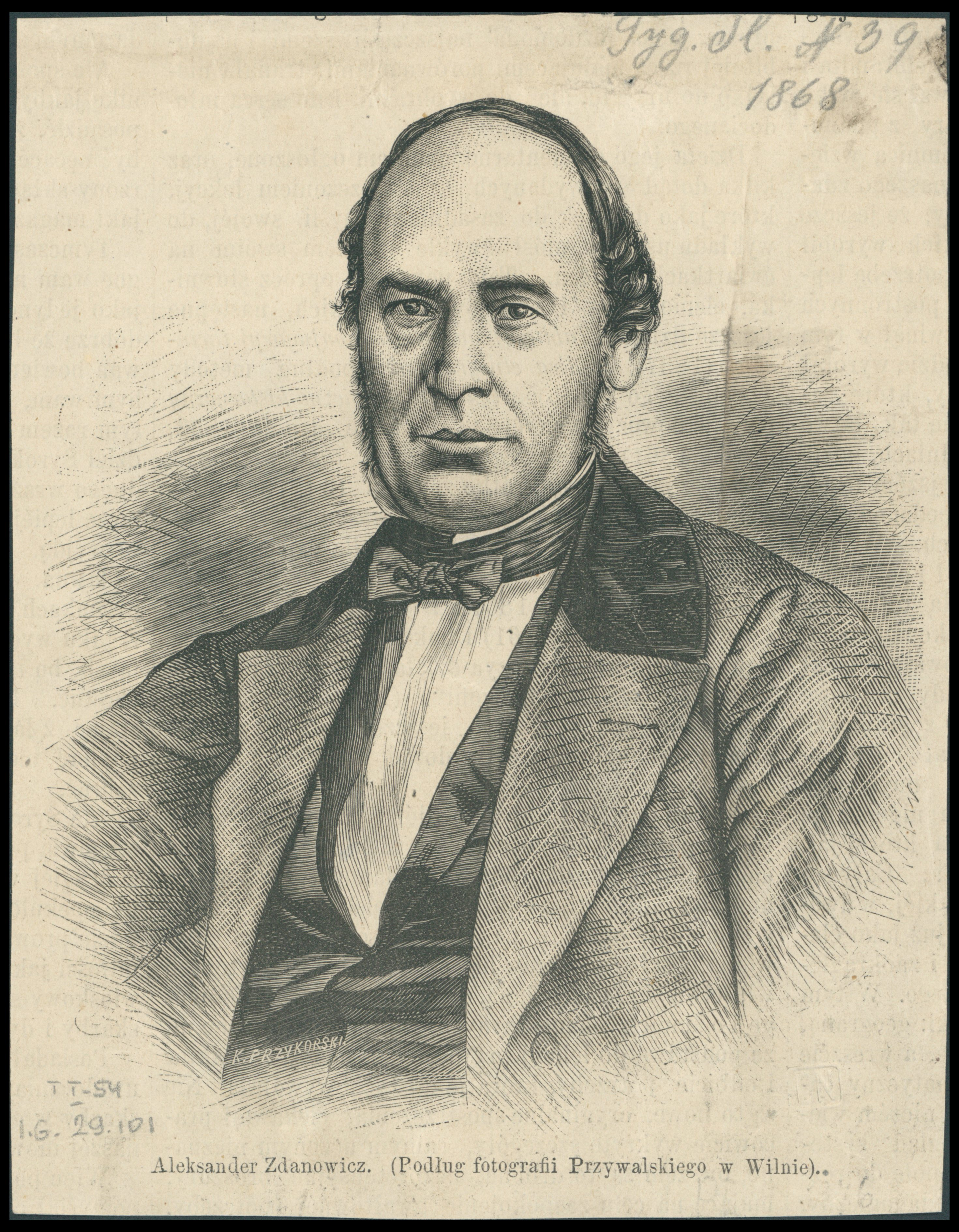 Aleksander Zdanowicz